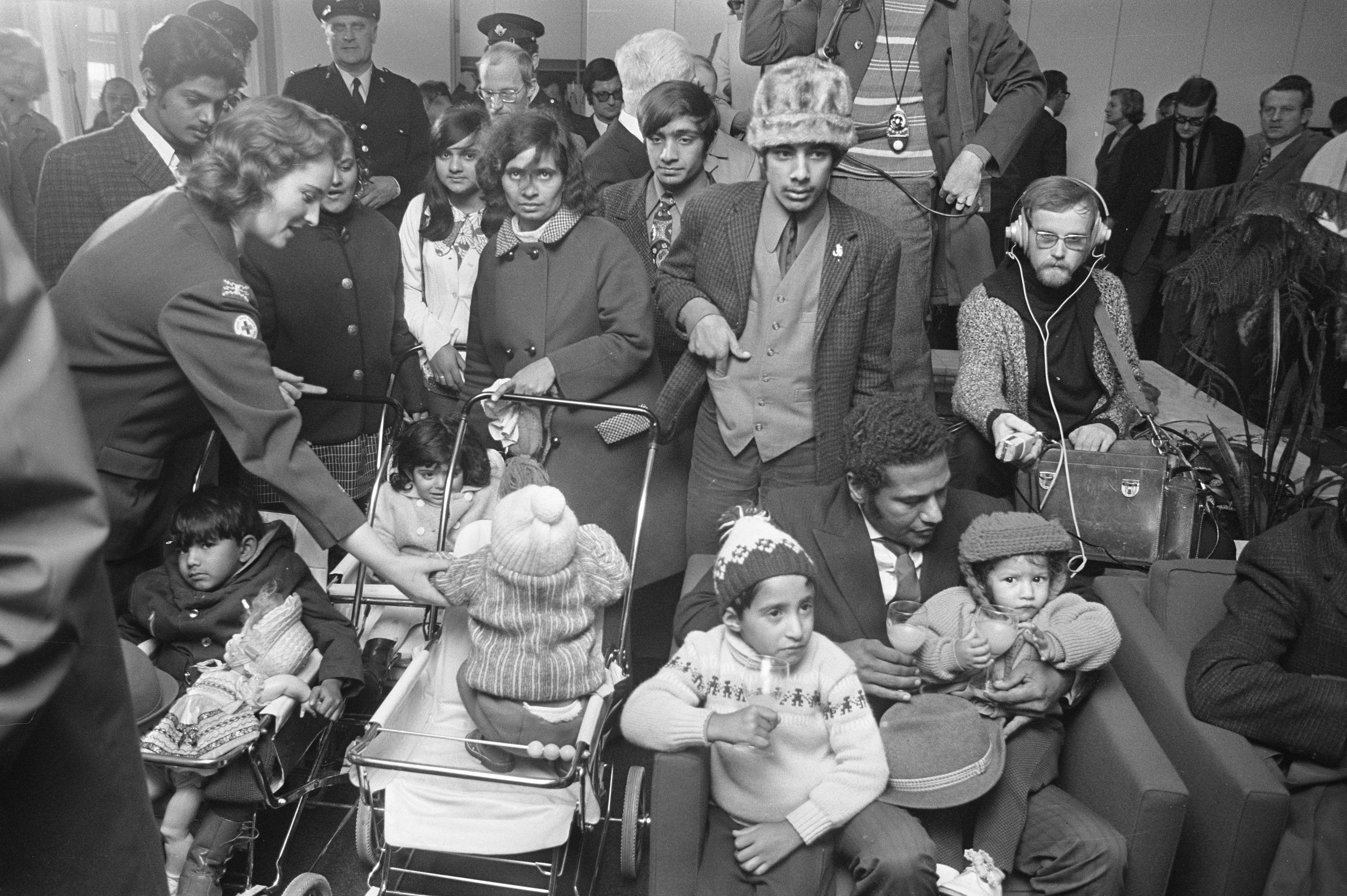 Collectie / Archief : Fotocollectie Anefo Reportage / Serie : [ onbekend ] Beschrijving : Aziaten die Oeganda uitgewezen zijn op Schiphol, groep Aziaten na aankomst Datum : 24 november 1972 Locatie : Noord-Holland, Schiphol Trefwoorden : aankomsten, families Persoonsnaam : Aziaten Fotograaf : Verhoeff, Bert / Anefo Auteursrechthebbende : Nationaal Archief Materiaalsoort : Negatief (zwart/wit) Nummer archiefinventaris : bekijk toegang 2.24.01.05 Bestanddeelnummer : 926-0503